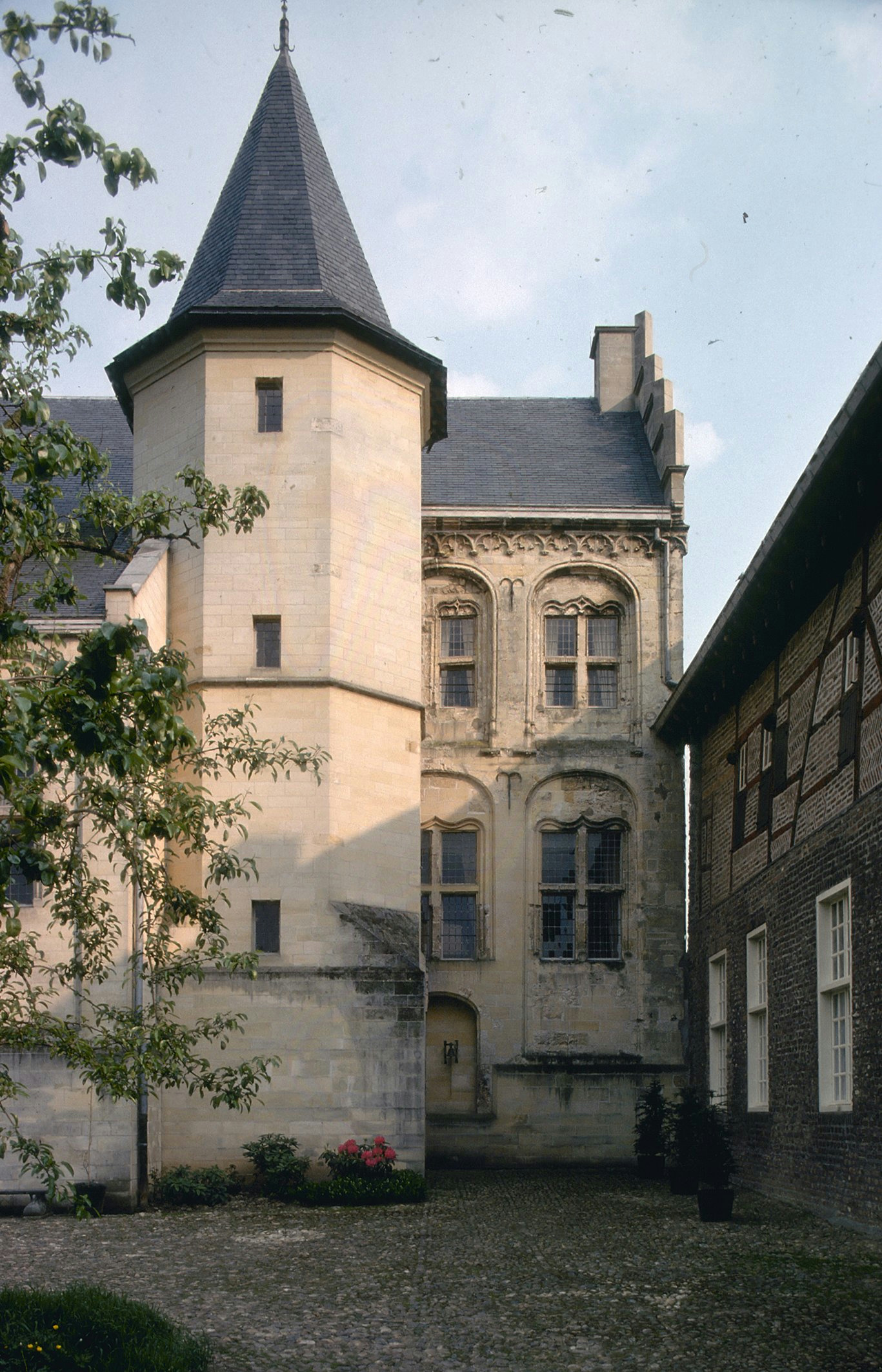 Kasteel Hasselholt (Het Goedje): Exterieur OVERZICHT